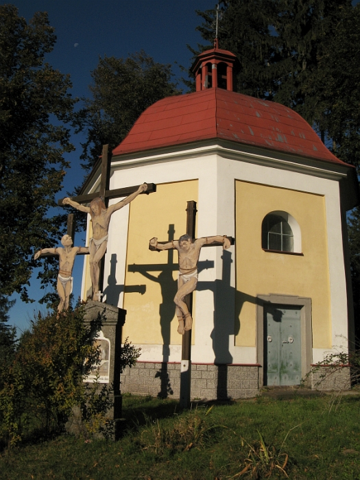 Kaple Utrpení Kristova (Miličín), Miličín